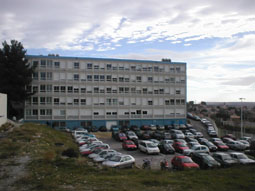 L'UFR de médecine site de Nîmes (30) Image perso